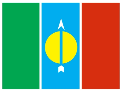 Bandera